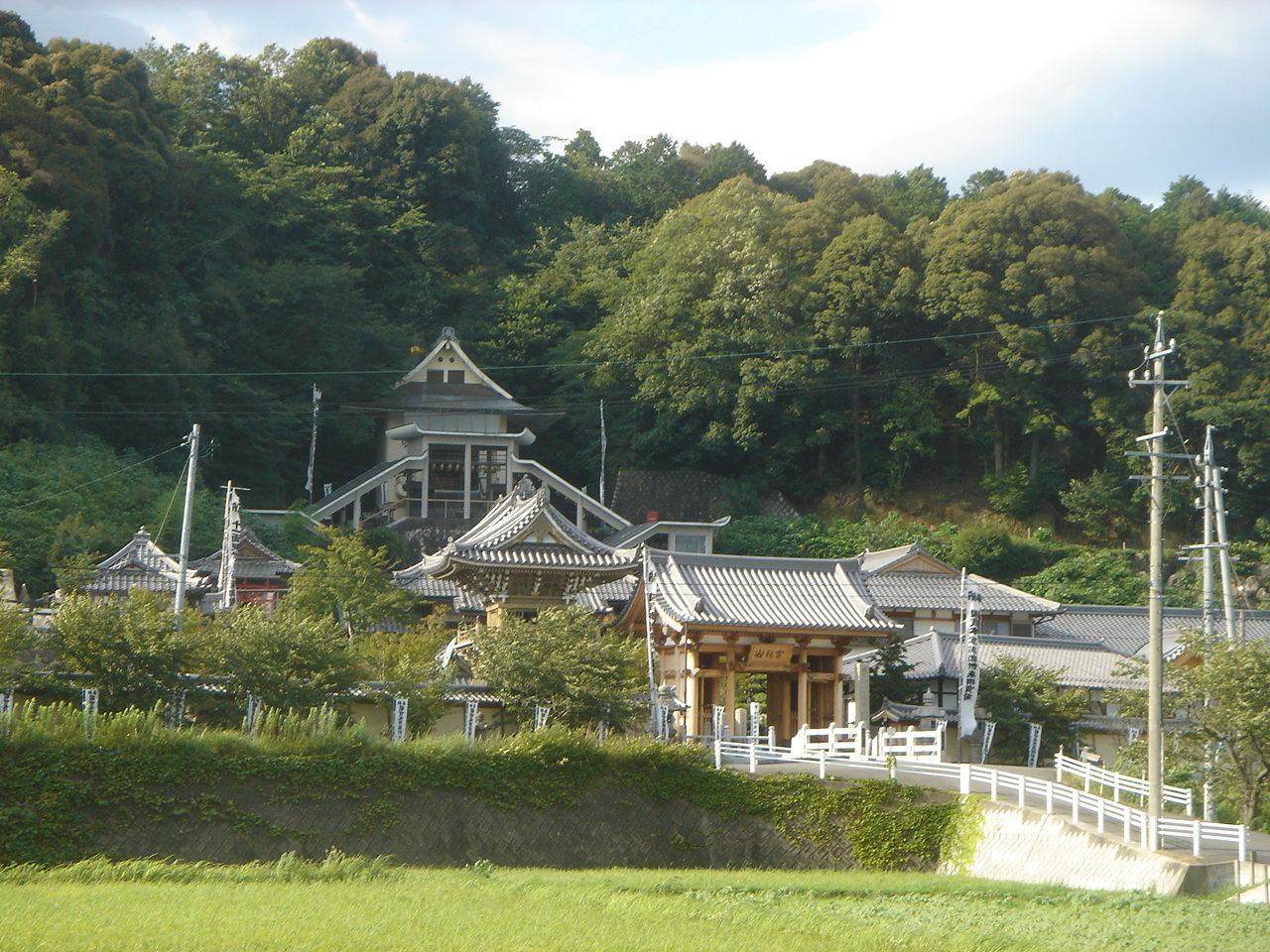 Mino-Kokubunji(Temple)(美濃国分寺),Ogaki,Gifu,Japan(岐阜県大垣市)で撮影